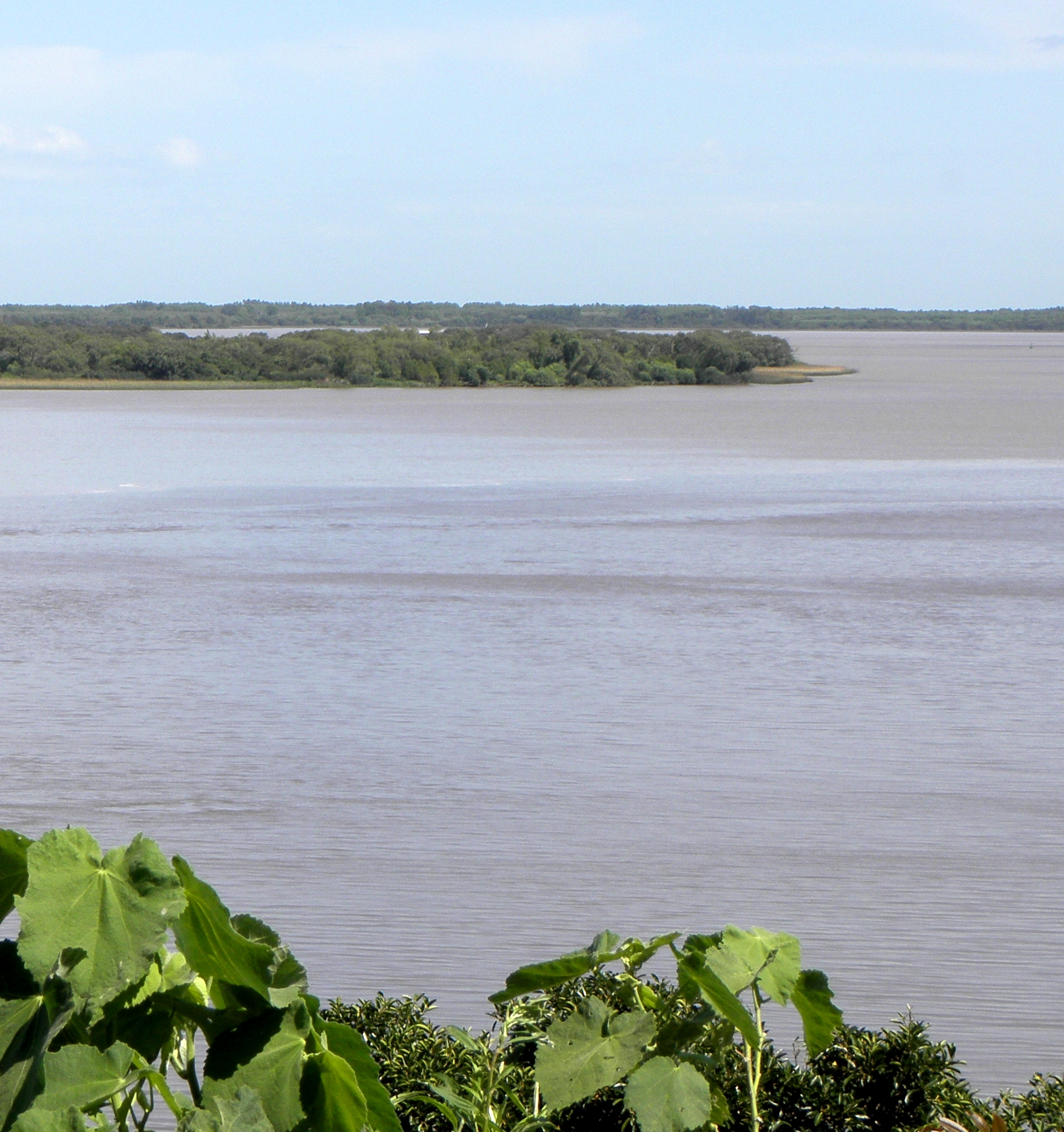 Desde la costa uruguaya, el río Paraná Bravo desembocando en el río Uruguay inferior, justo antes de que este último dé nacimiento al Río de la Plata.